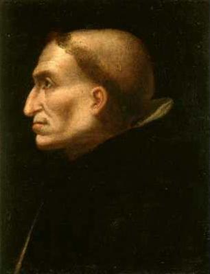 Depicted person: Girolamo Savonarola